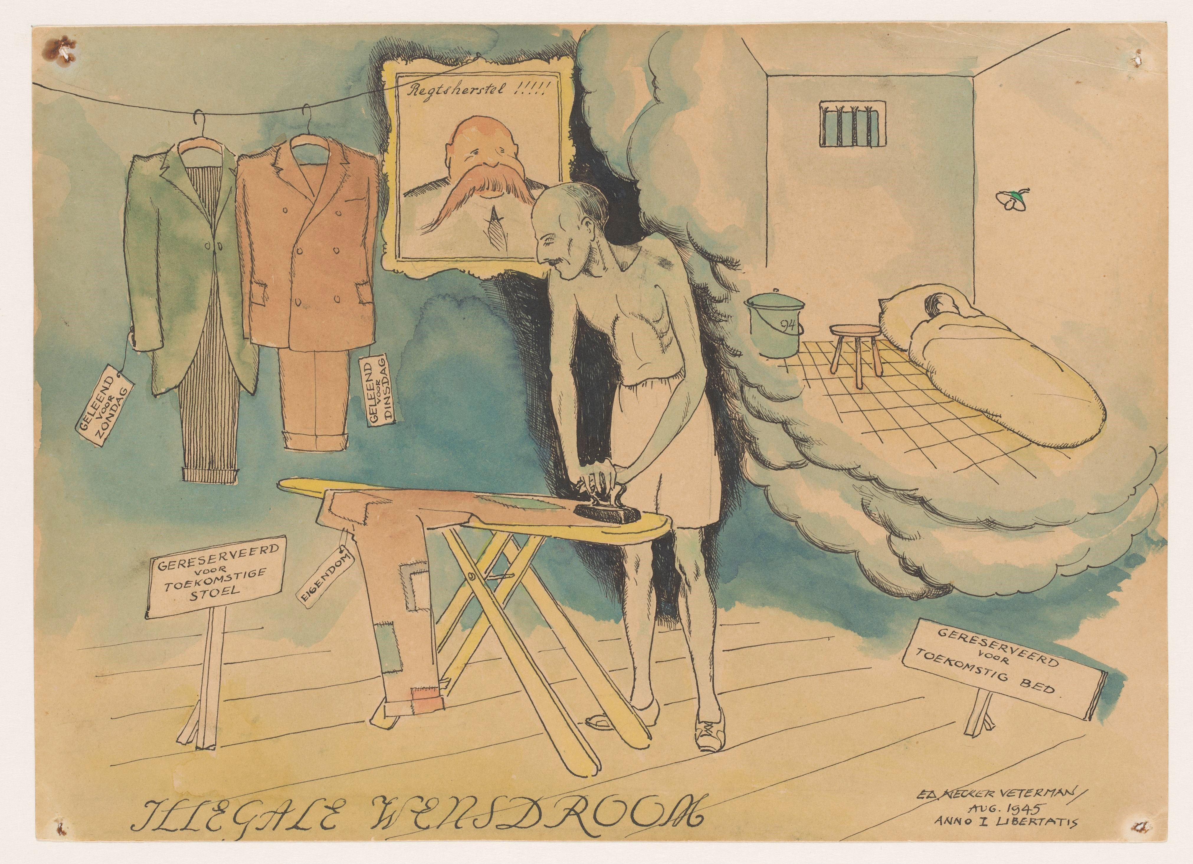 Illegale wensdroom, Eduard Veterman, 1945.. dentificatie Titel(s)Illegale wensdroom (titel op object) Objecttypetekening ObjectnummerNG-1983-13 Opschriften / Merken signatuur en datum, rechtsonder, handgeschreven: ‘ED. NECKER VETERMAN/ AUG. 1945 / ANNO I LIBERTATIS’ OmschrijvingMagere man met snor (Veterman) in onderbroek aan strijkplank, strijkt zwaar versleten broek waaraan kaartje met: EIGENDOM. Rechts in een wolk de herinnering aan de cel in het Oranjehotel in Scheveningen waarin Veterman gevangen heeft gezeten. Links 2 kostuums aan waslijntje met kaartje waarop: GELEEND VOOR ZONDAG en GELEEND VOOR DINSDAG. Midden achter aan de wand portret van dikke man met snor (Minister Gerbrandy) en opschrift: Reghtsherstel!!!!!. Vervaardiging Vervaardiger tekenaar: Eduard Veterman Plaats vervaardigingNederland Dateringaug-1945 Materiaal en Techniek Fysieke kenmerkenpen in zwart met penseel in kleuren Materiaalpapierinkt Afmetingenl 221 mm × b 309 mm Onderwerp Wat Tweede Wereldoorlog Bevrijding Tweede Wereldoorlog Wanneer 1940 - 1945 Wie Eduard Veterman Pieter Sjoerds Gerbrandy Verwerving en rechten Credit line Schenking van M.J.T. Peters-Moormann, Nijmegen Verwervingschenking jan-1983 CopyrightPubliek domein